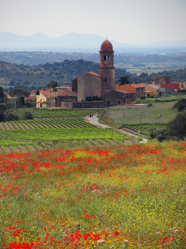 Vista del poble d'Espolla, des del nord, amb vinyes i conreus en primer terme.